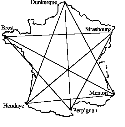 cartes des 9 Diagonales de France